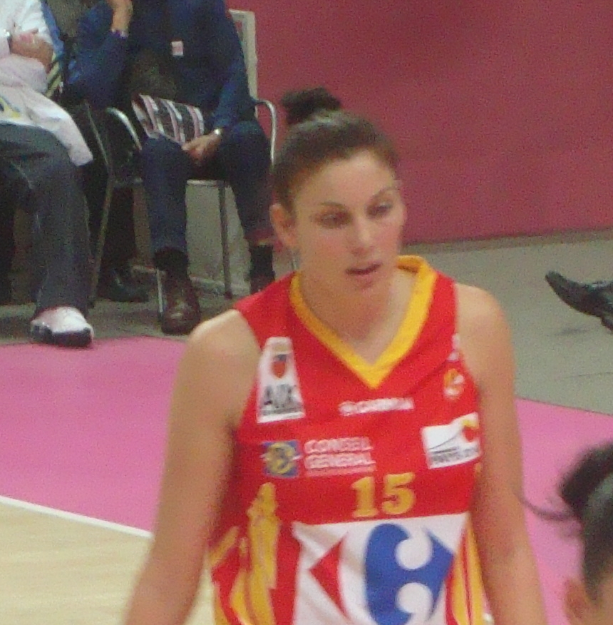 La basketteuse australienne Hollie Grima sous le maillot d'Aix lors de l'Open LFB 2010.